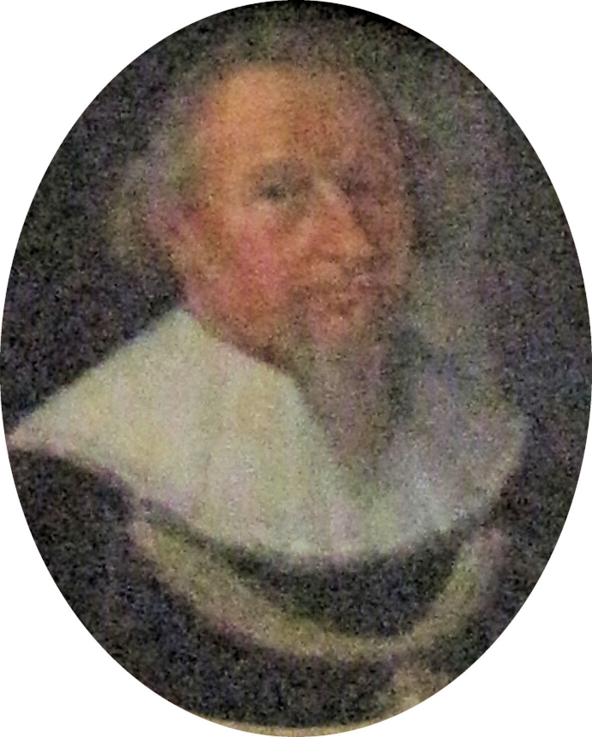 Epitaph-Porträt des Lübecker Syndicus Otto Tanck (1587-1637)